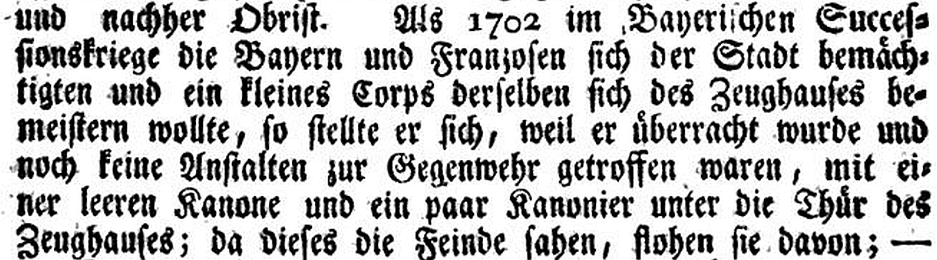 Aus dem Leben von Johann Matthäus Faulhaber (1670-1742). In: Albrecht Weyermann (Hrsg.): Nachrichten von Gelehrten, Künstlern und andern merkwürdigen Personen aus Ulm, Wagner, Ulm 1798, S. 216.